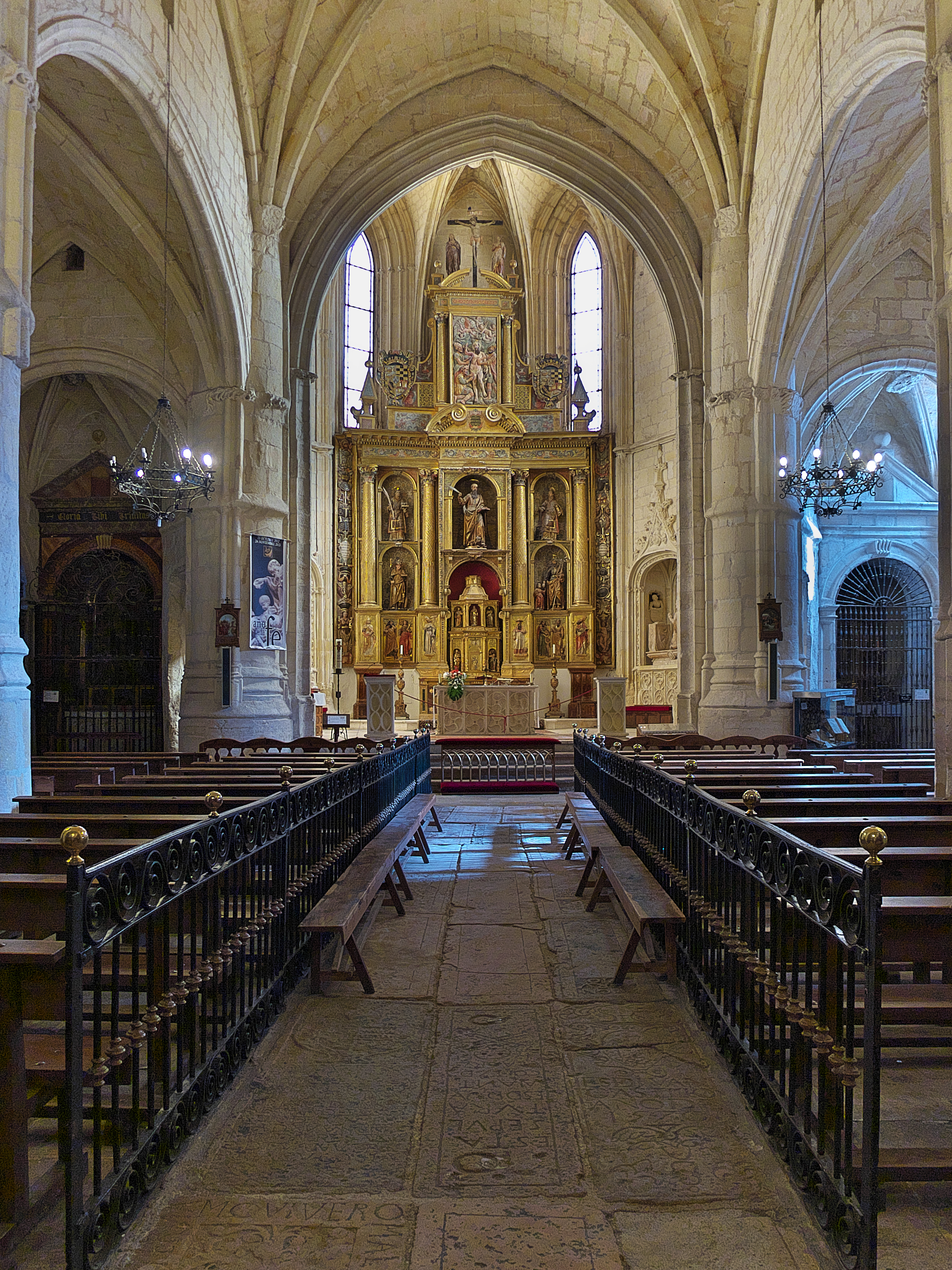 El marqués de Villena, Juan Pacheco, encarga a los maestros vizcaínos Bonifacio Martín y Marquina el replanteamiento de la iglesia (1459)